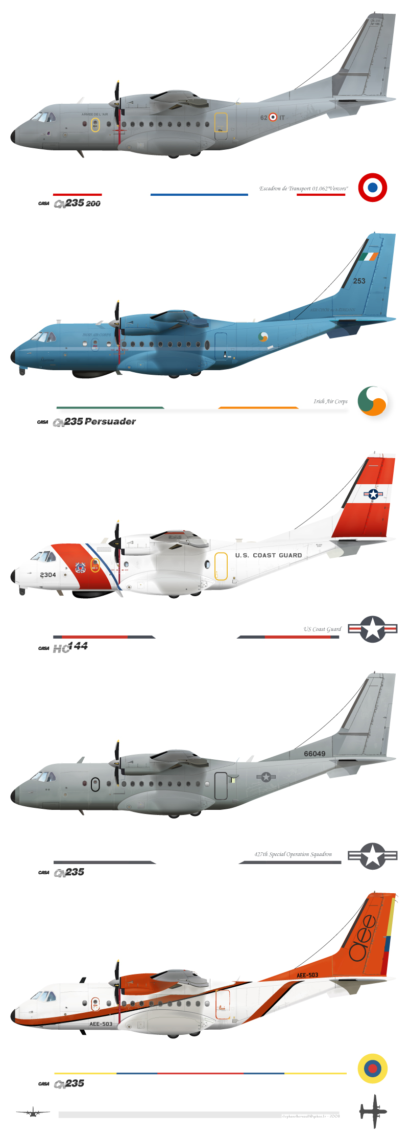 Casa CN 235 utilisés par France/Irlande/USA/Equateur